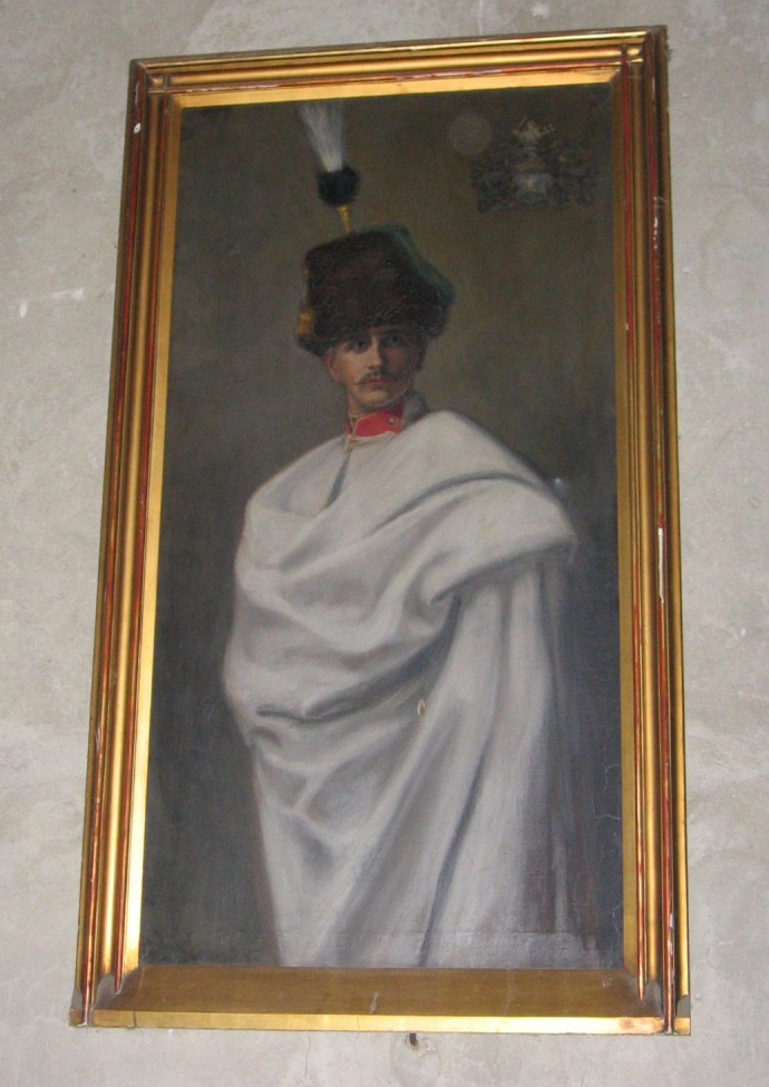 Sandor Szapary